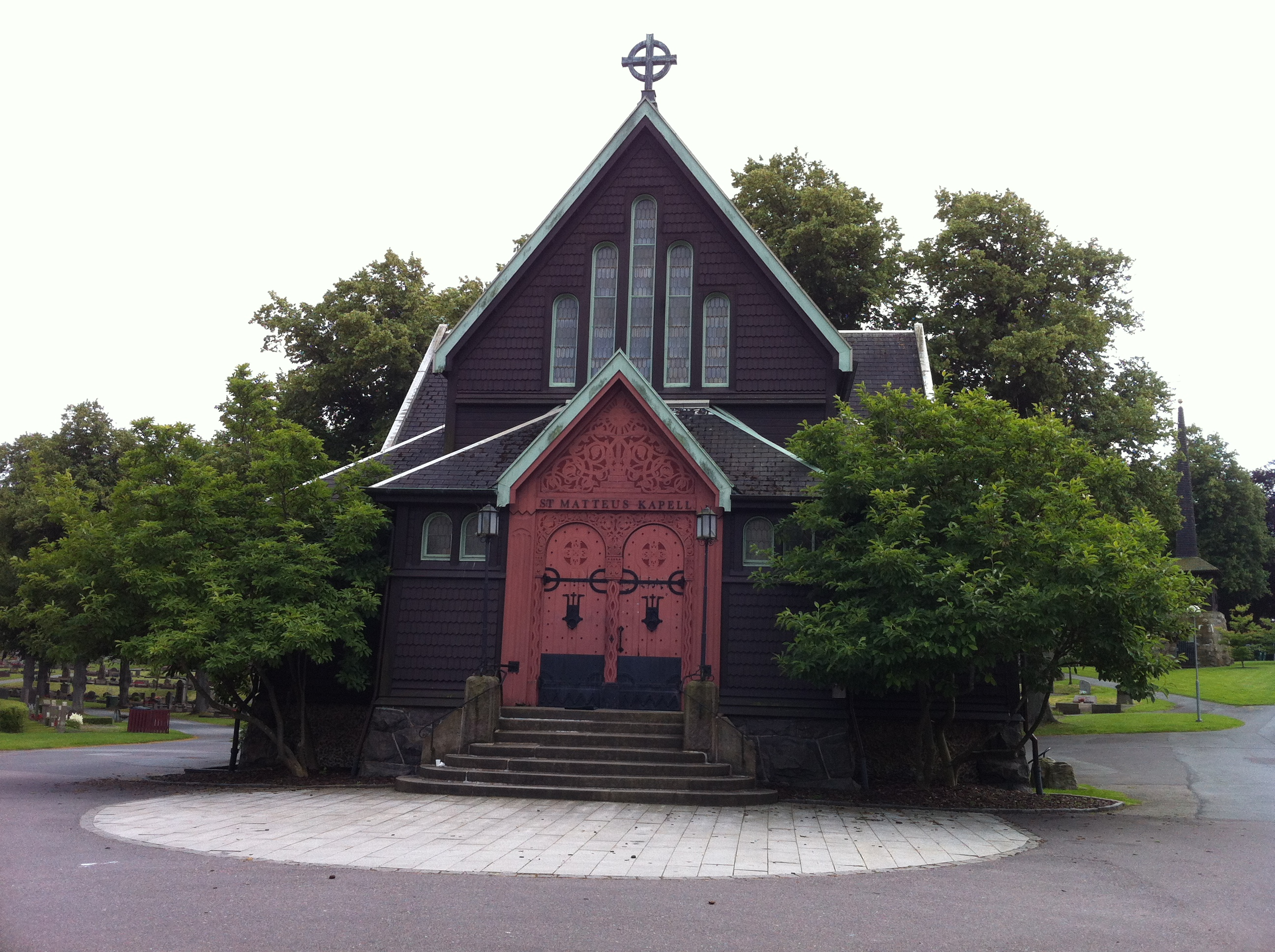 St Matteus kapell på Västra kyrkogården i Göteborg. Ritad av Yngve Rassmusen.